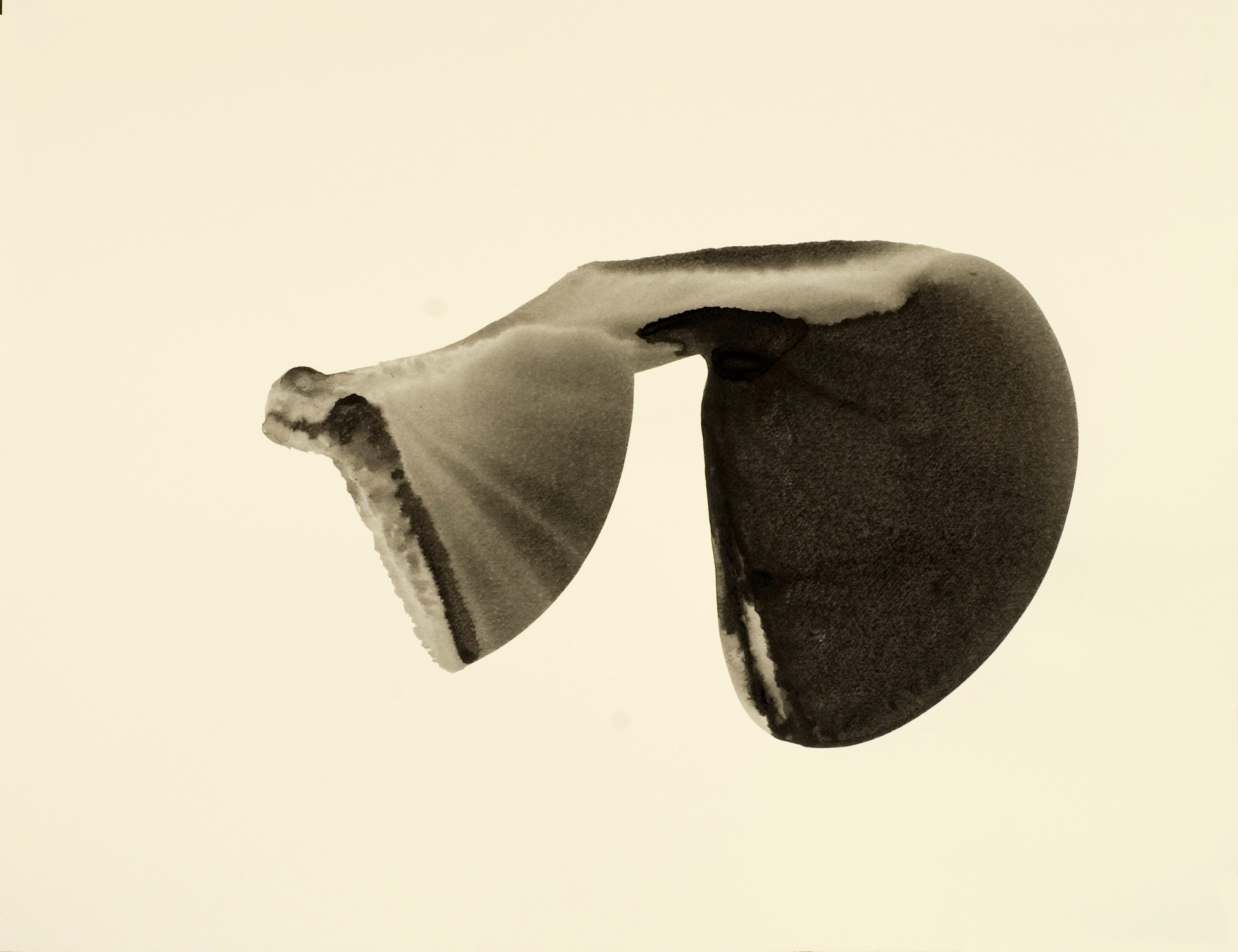 ציור במברשת, 2009, אקריליק על נייר